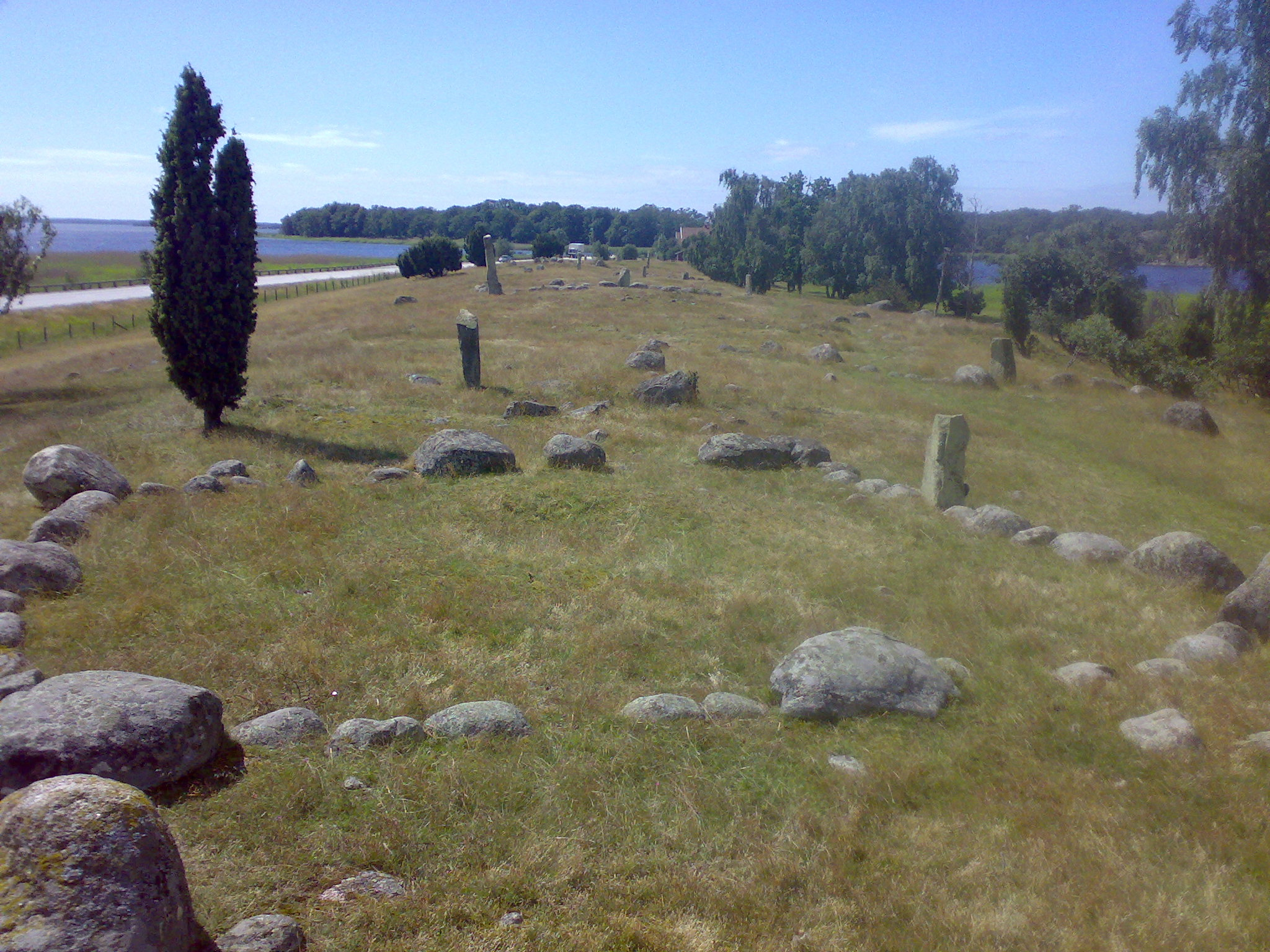 Hjortahammar, Blekinge, Sweden